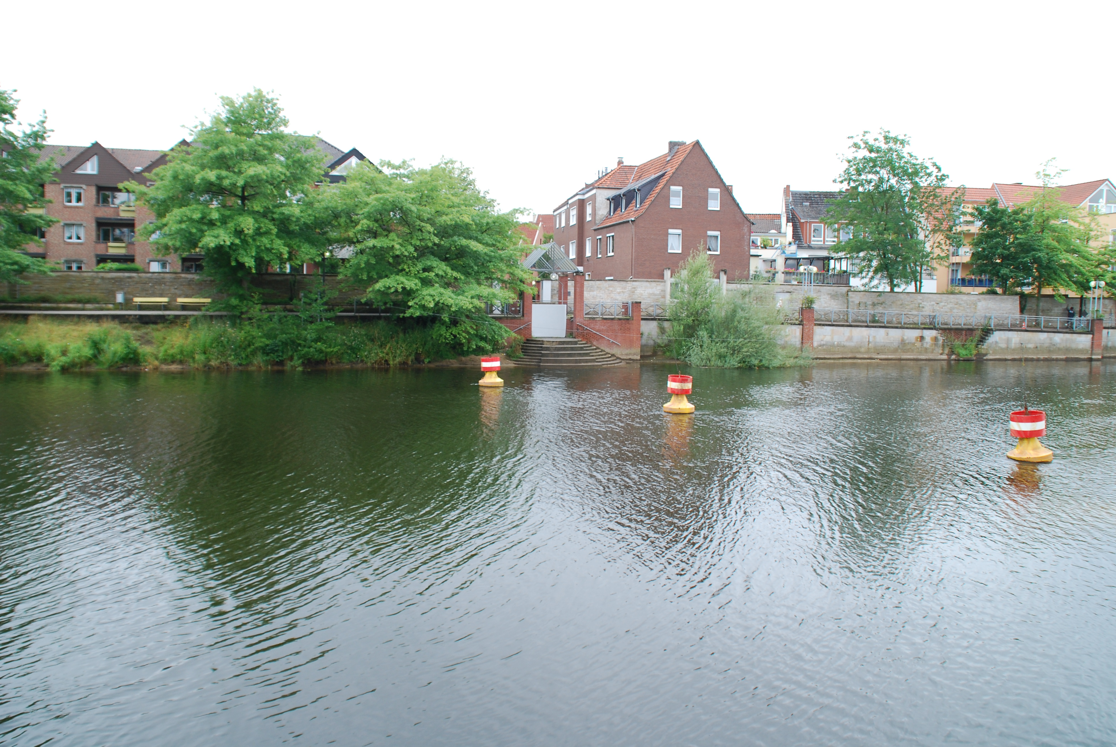 Ungefähre Lage der alten Emsfurt. Blick auf das Waskschapp, die ehemalige Waschstelle der Stadt Rheine